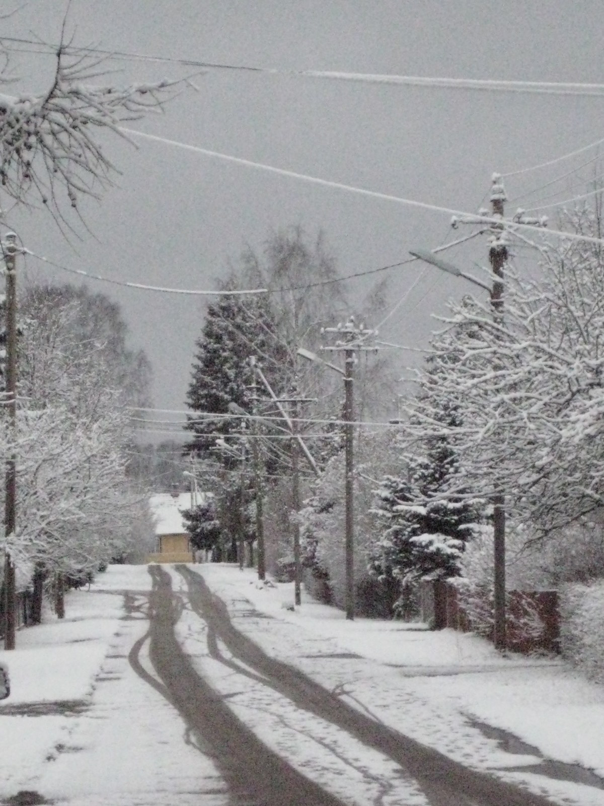 Uus tänav Taebla alevikus. Pildistatud lääne suunas